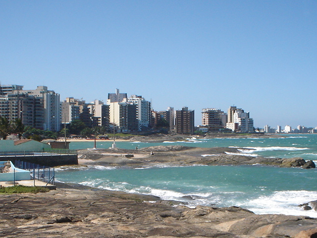 Guarapari, Brasil